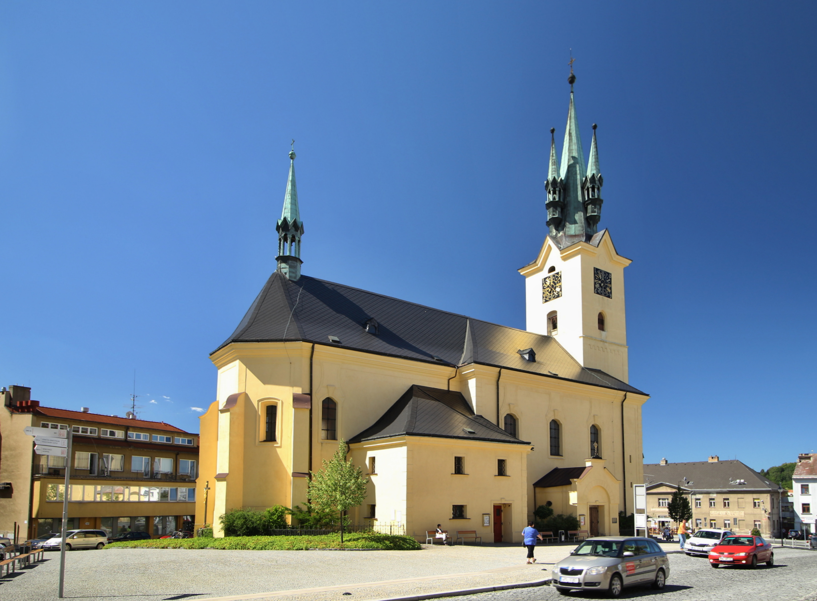 Náměstí T. G. Masaryka (Příbram)